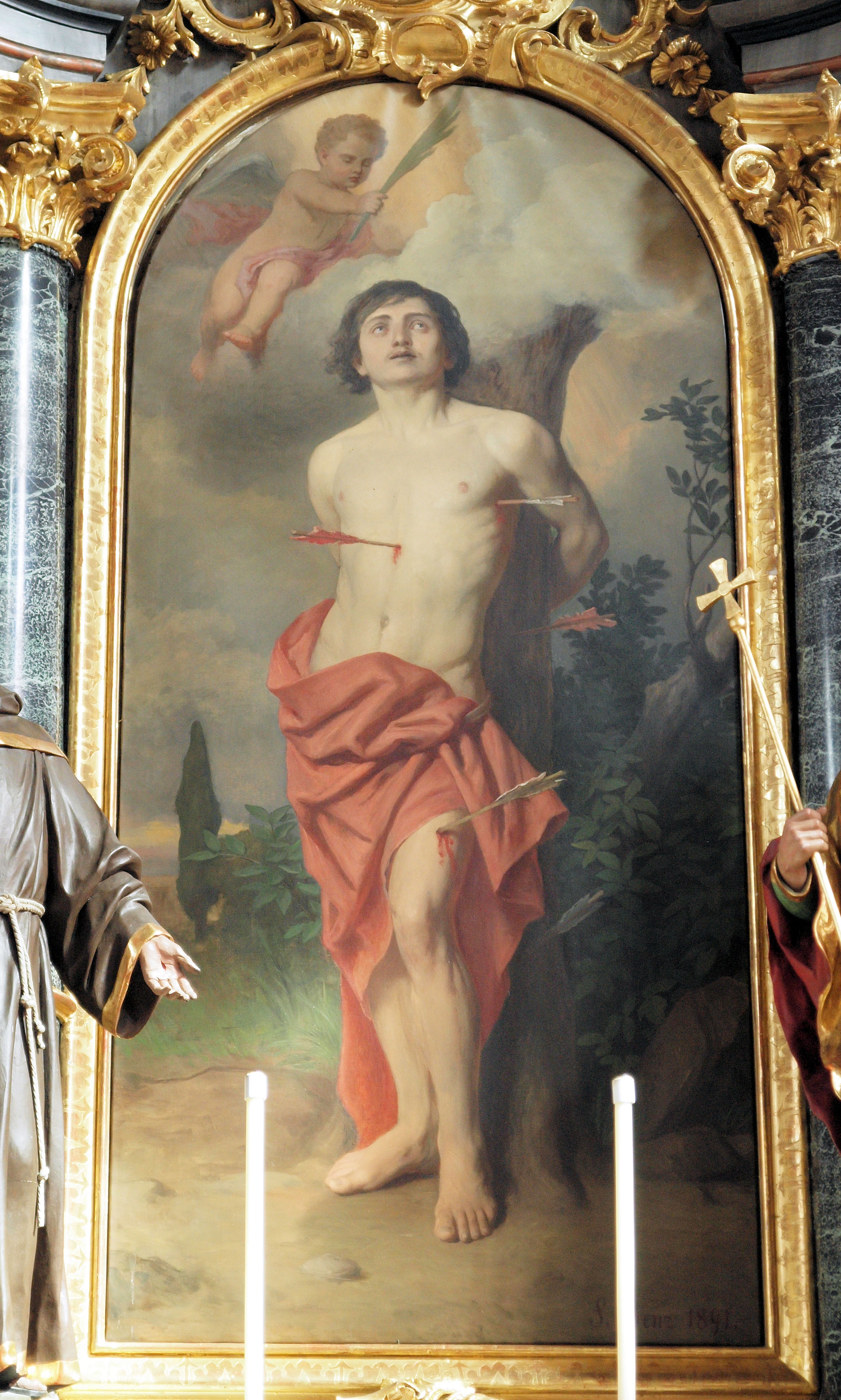 Das Altarbild des Sebastinas Altar der Pfarrkirrche Appenzell. Das Bild wurde 1890-92 von Severin Benz gemahlt.